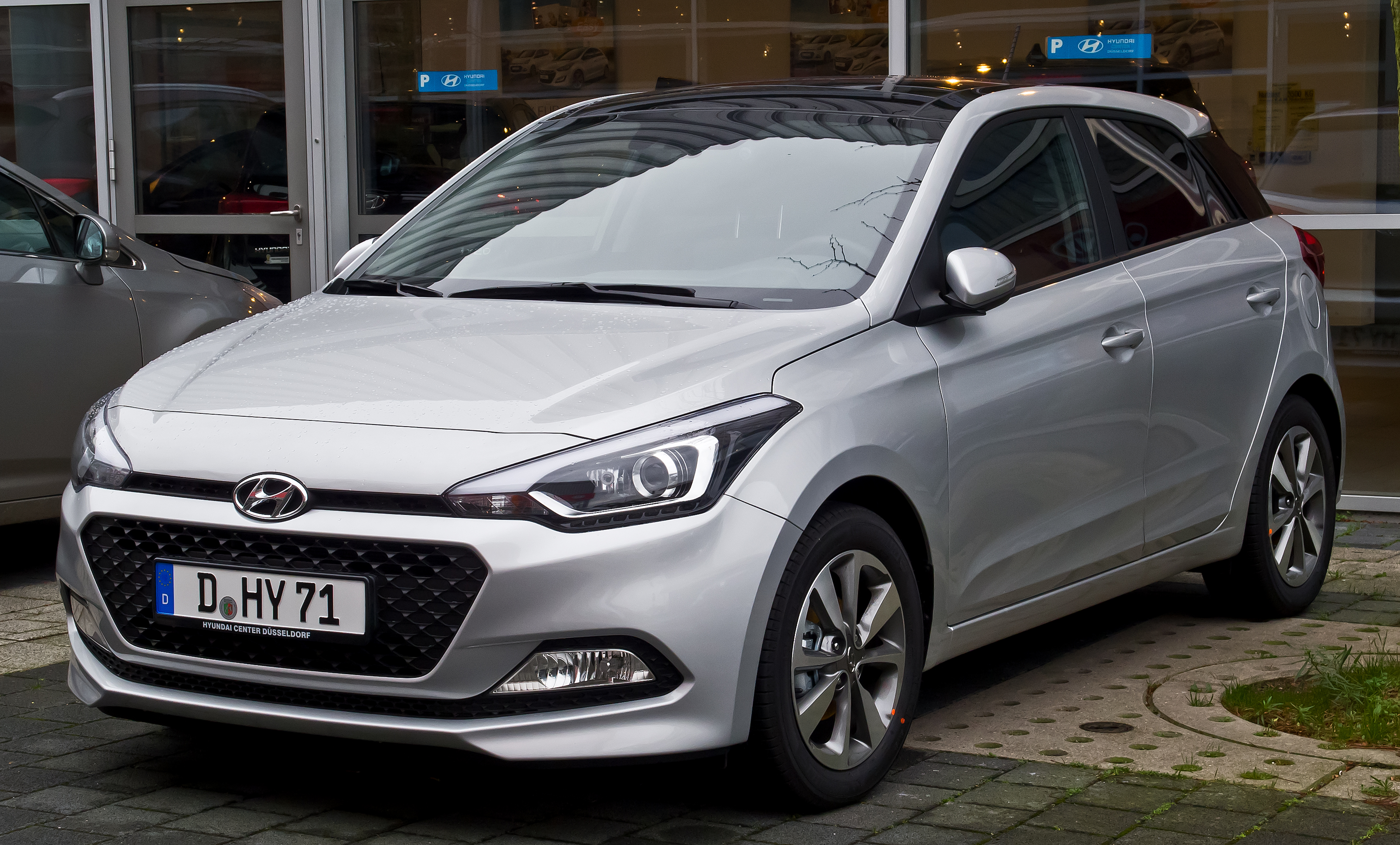 Hyundai i20 Trend (II)